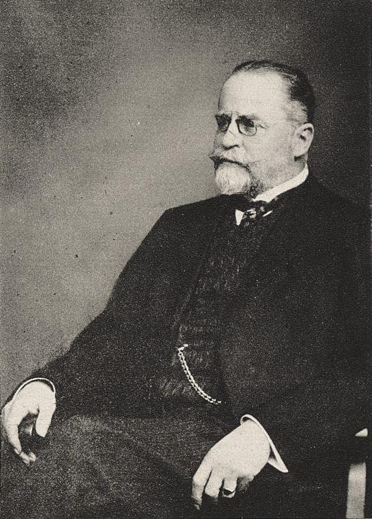 Obergerichtspräsident Dr. Adolph von Staff, 1916